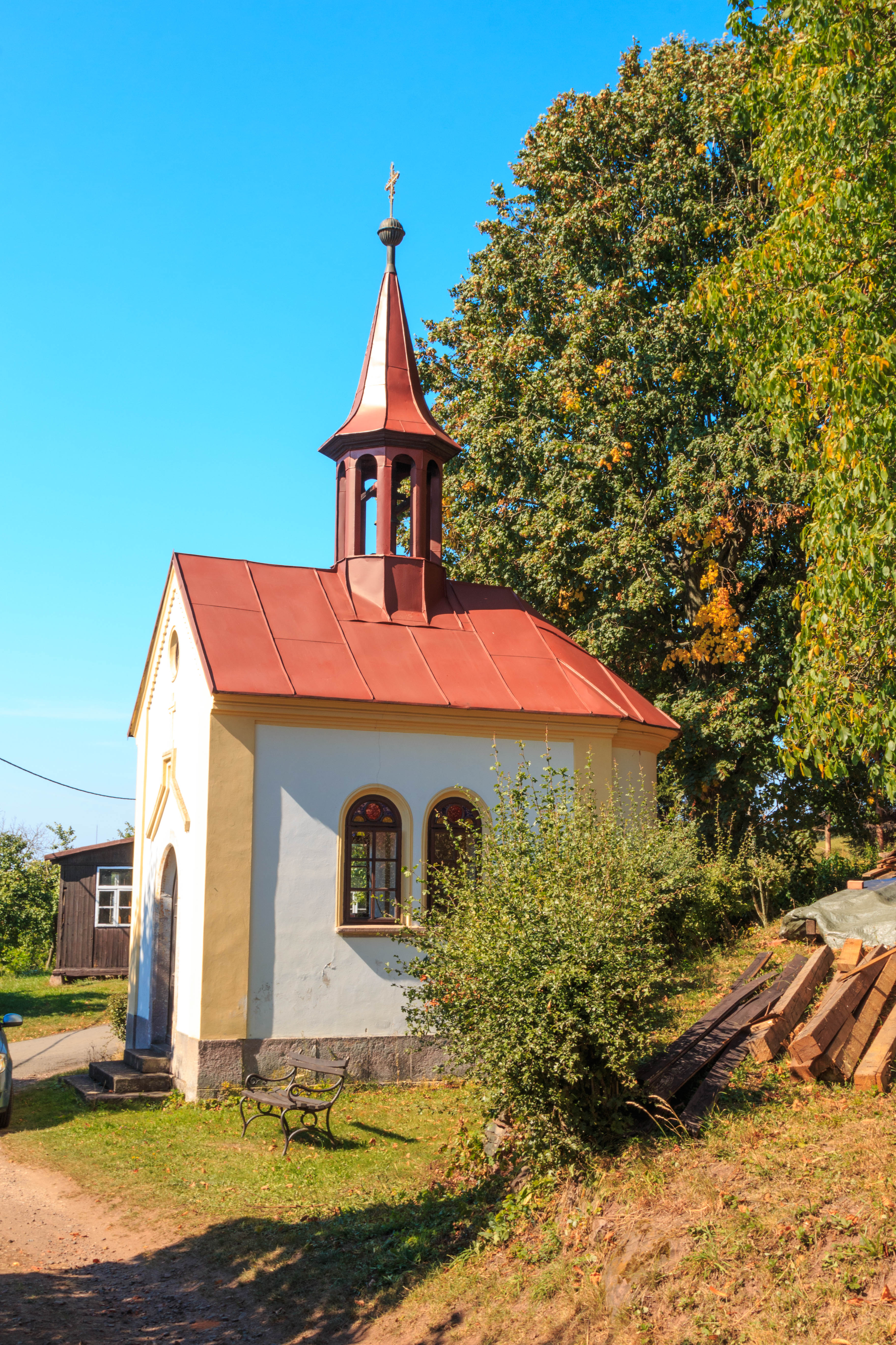 Bezděčín u Stružince - kaplička